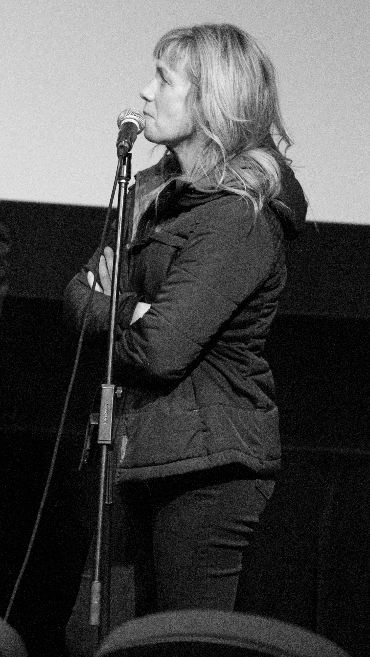 Échanges avec le public lors de la projection, à la Cinémathèque québécoise, du film Le Vent du Wyoming. On voit sur la photo Donald Pilon, André Forcier et Céline Bonnier.